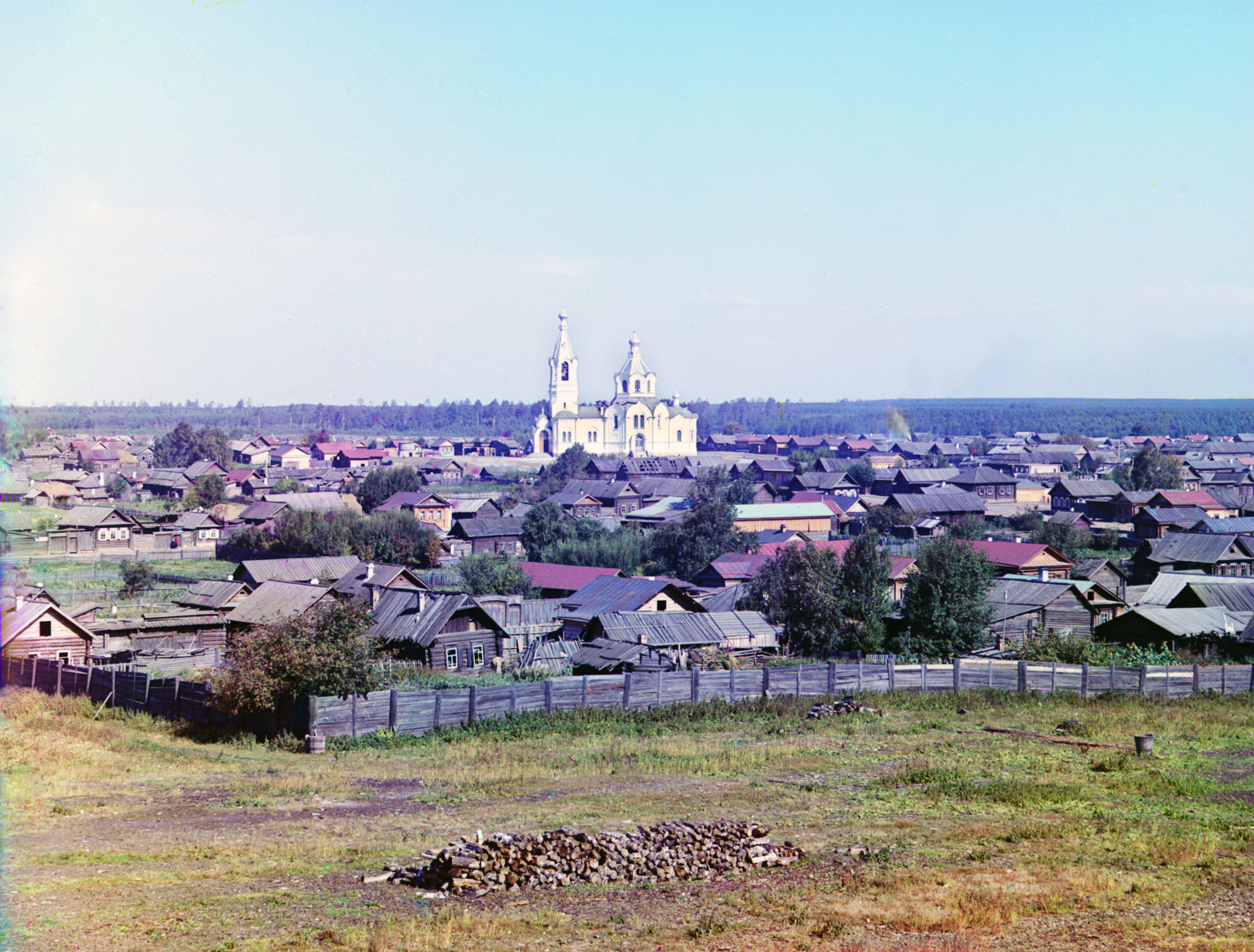 Посёлок ВИЗа (Сейчас на его месте находится мкр.Заречный)